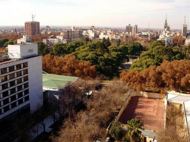 Mendoza, Argentina in autumn.Mendoza, Argentina